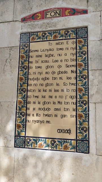 Church of the Pater Noster, Mount of Olives, Jerusalem, Israel כנסיית אבינו שבשמים Sanctuary of the Eleona